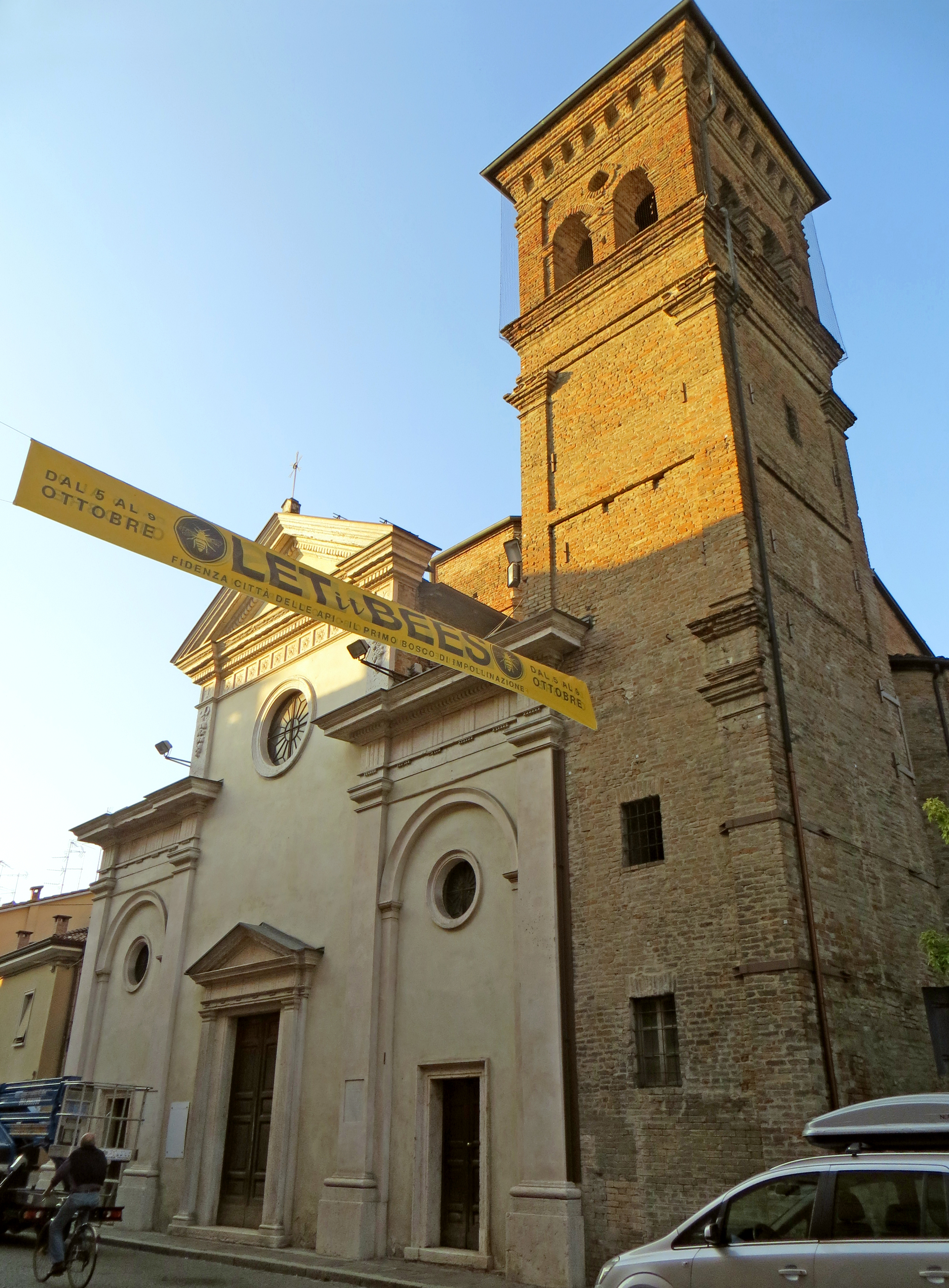 Chiesa di San Michele Arcangelo (Fidenza) - facciata